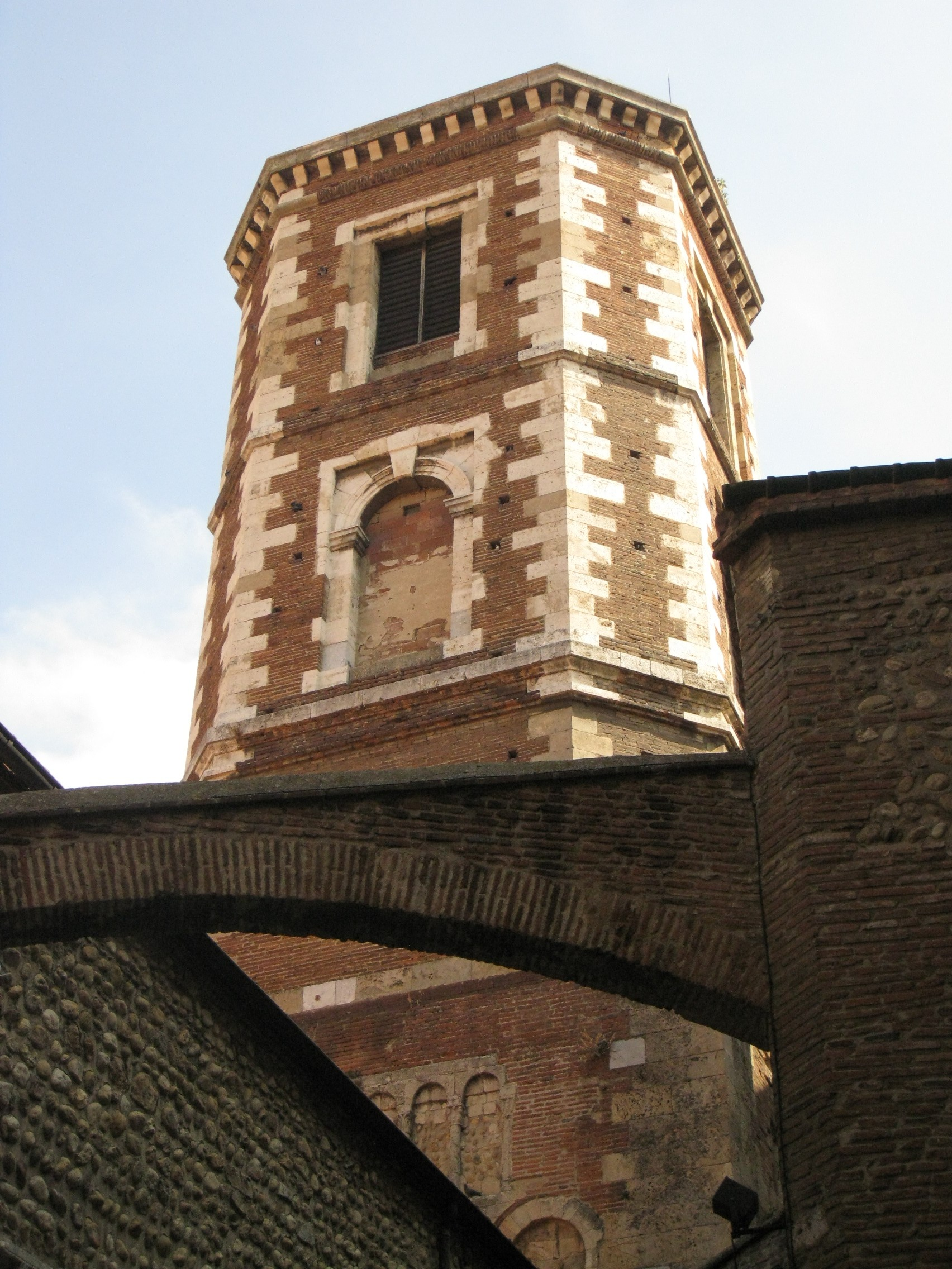 Església de Sant Joan el Vell (Perpinyà), campanar .